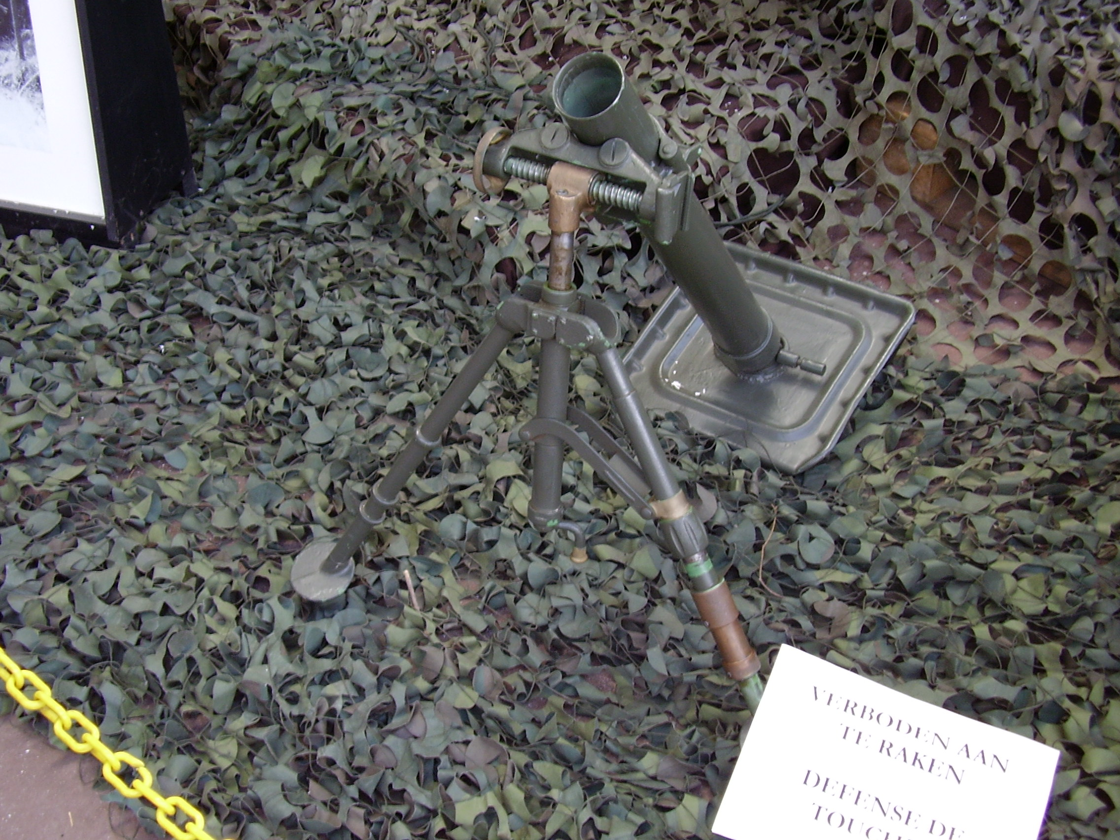 Royal Military Museum Brussels, Musée Royal de l'Armée, Koninklijk Museum van het Leger en de Krijgsgeschiedenis